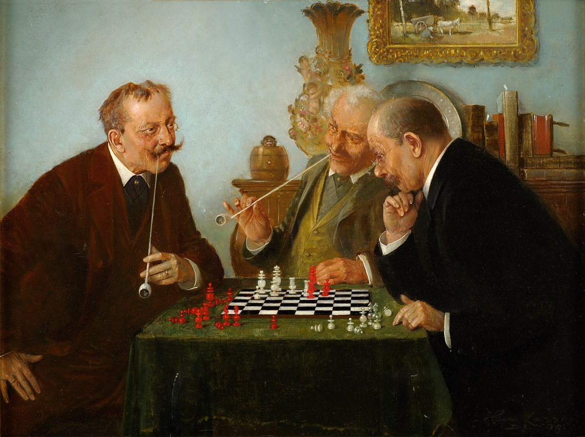 Eine spannende Partie. Signiert. Datiert "98". Öl auf Holz, 30 x 40 cm